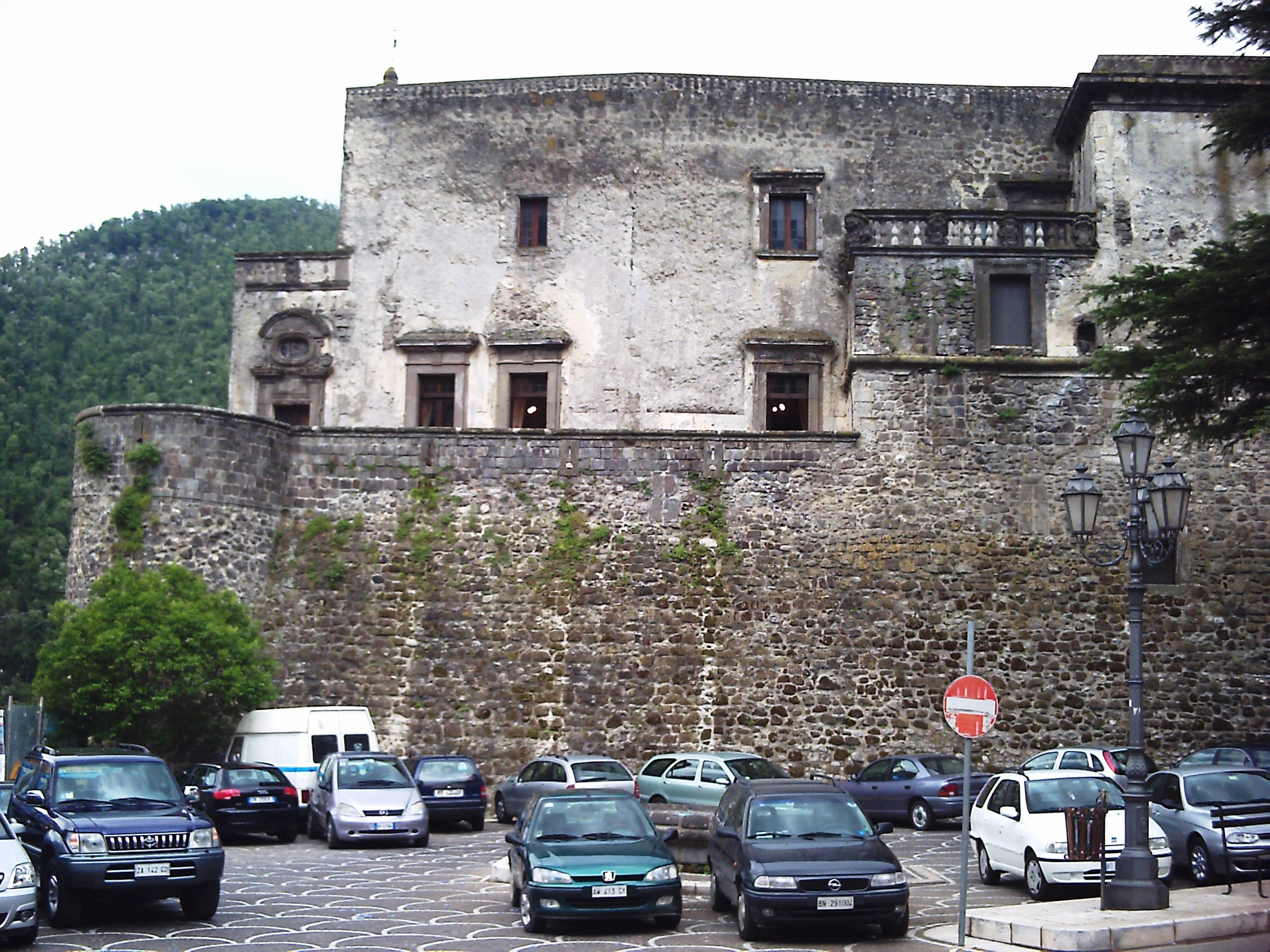 Il Castello Ducale visto dalla piazza - Faicchio (Bn)